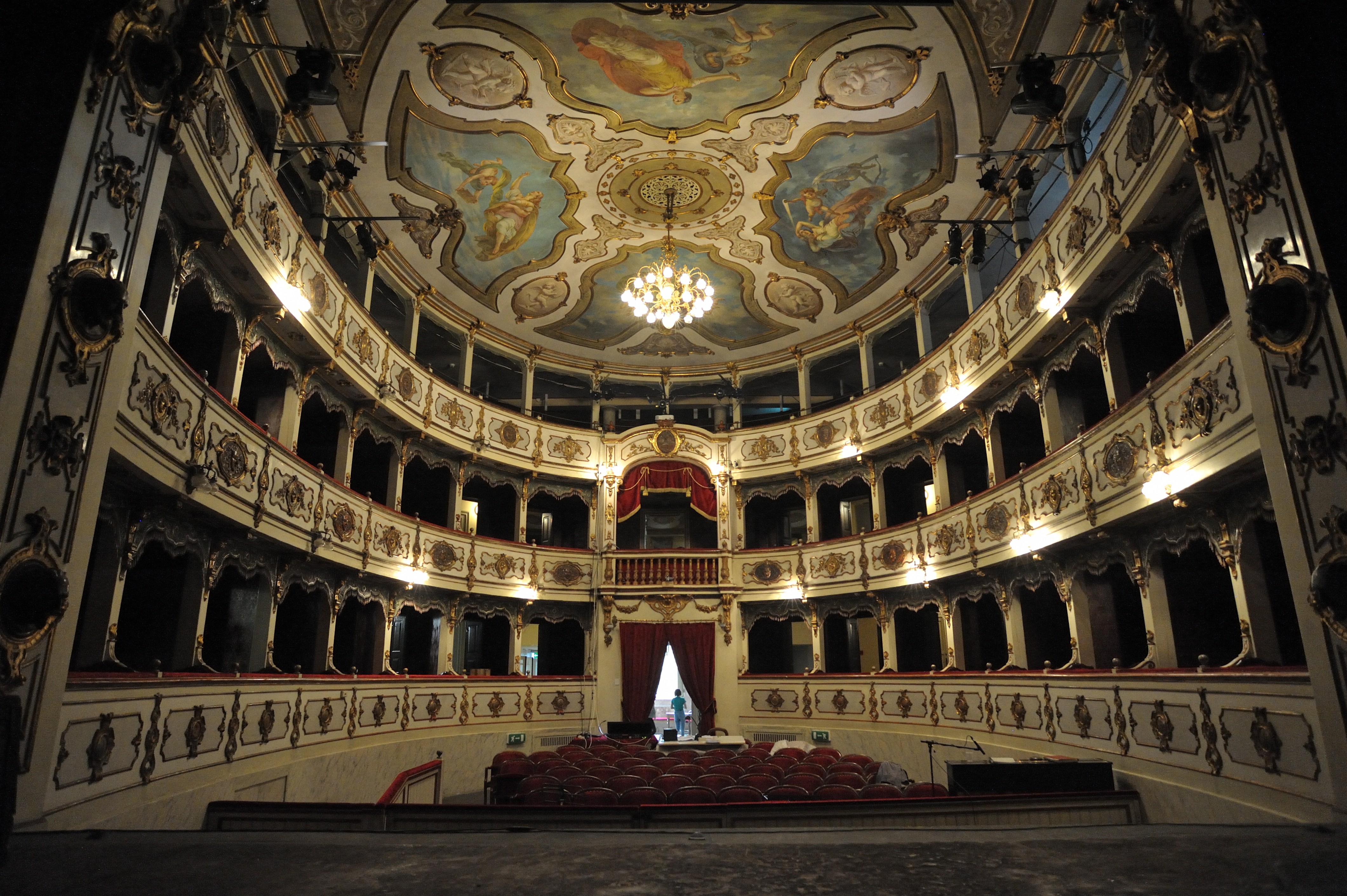 Teatro Giuseppe Verdi, sala, palchetti, soffitto affrescato This is a photo of a monument which is part of cultural heritage of Italy.